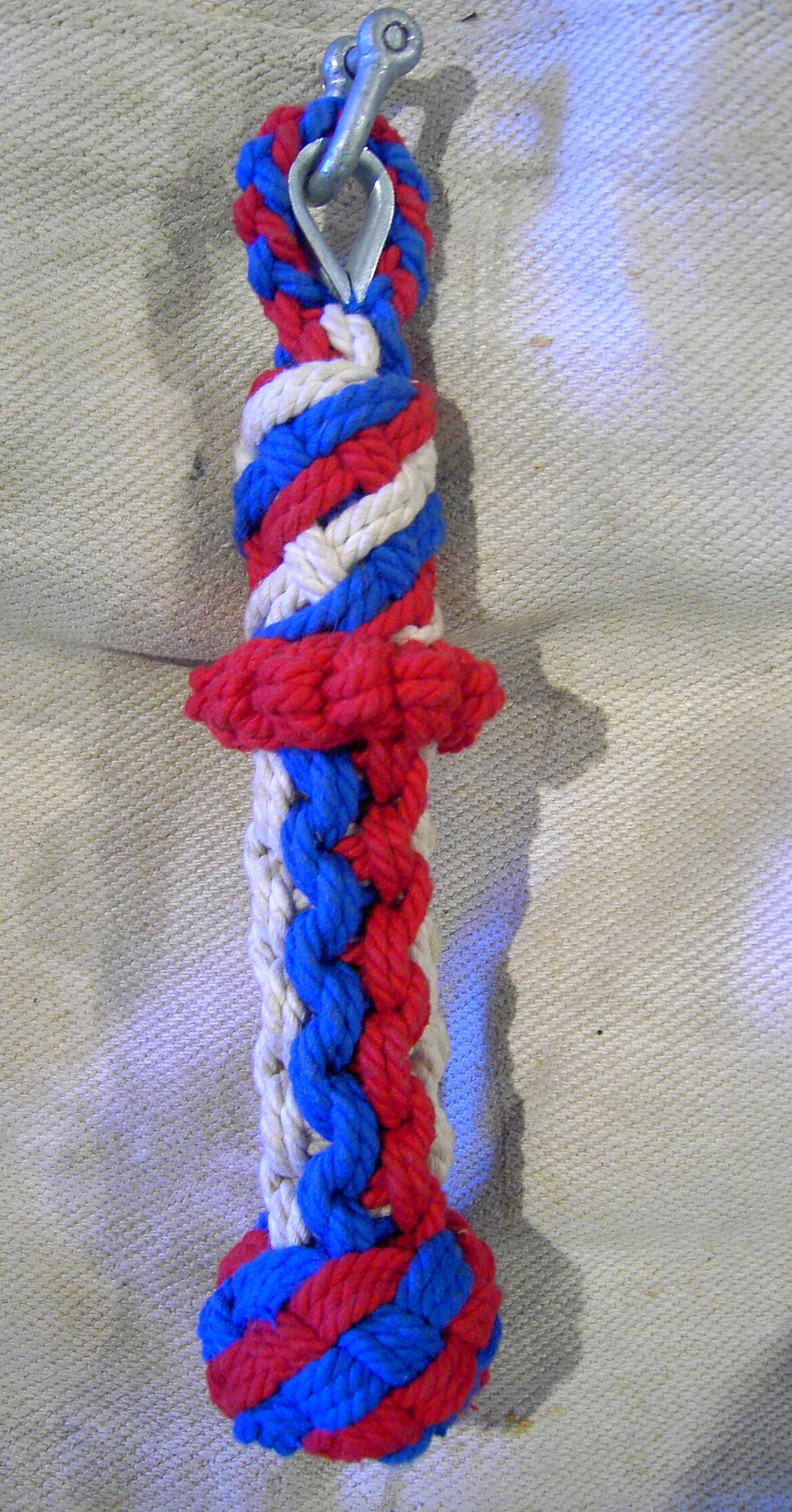 Bellrope